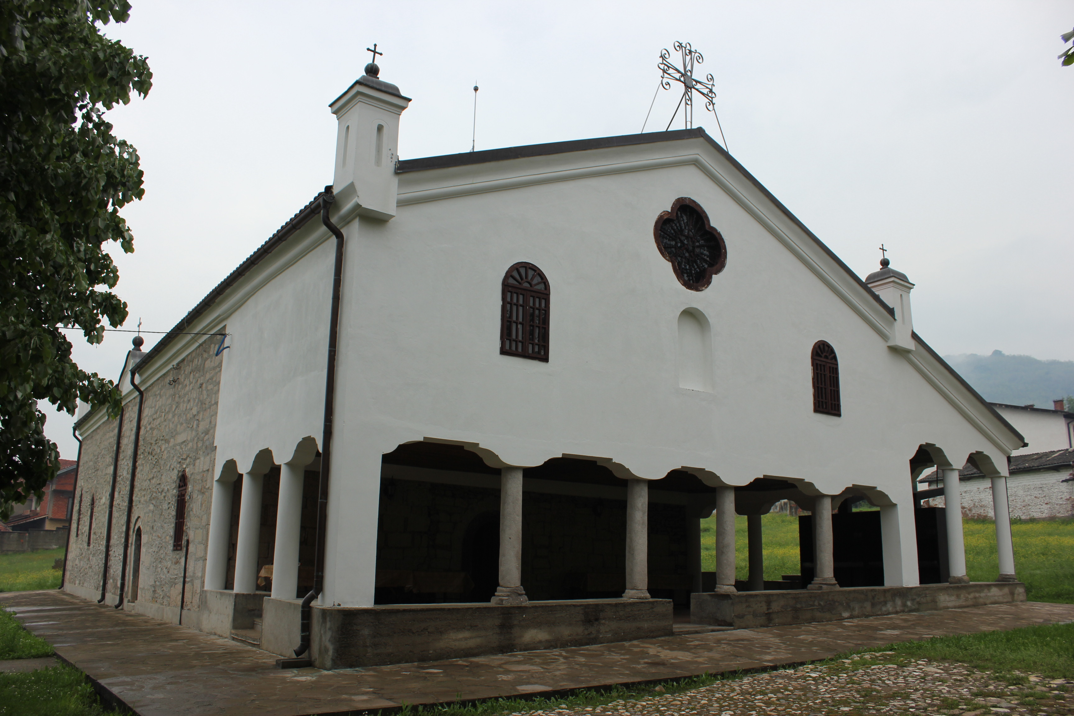 Църква „Слизането на Св. Дух над апостолите" (Св. Петдесетница) в град Власотинце, Сърбия.